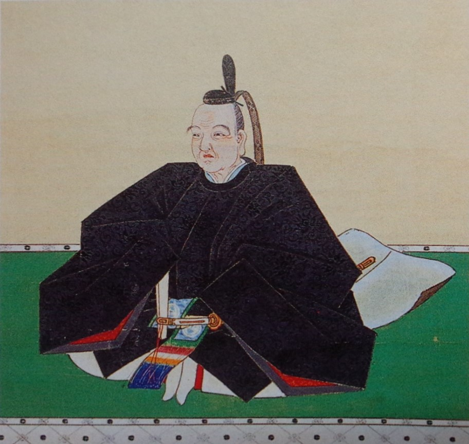 南部重信の肖像。